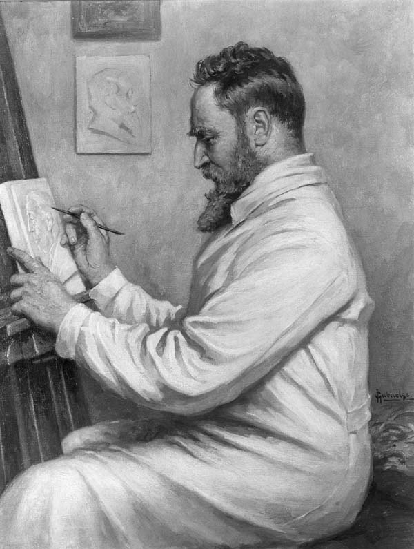 Portret van Johannes Cornelis Wienecke